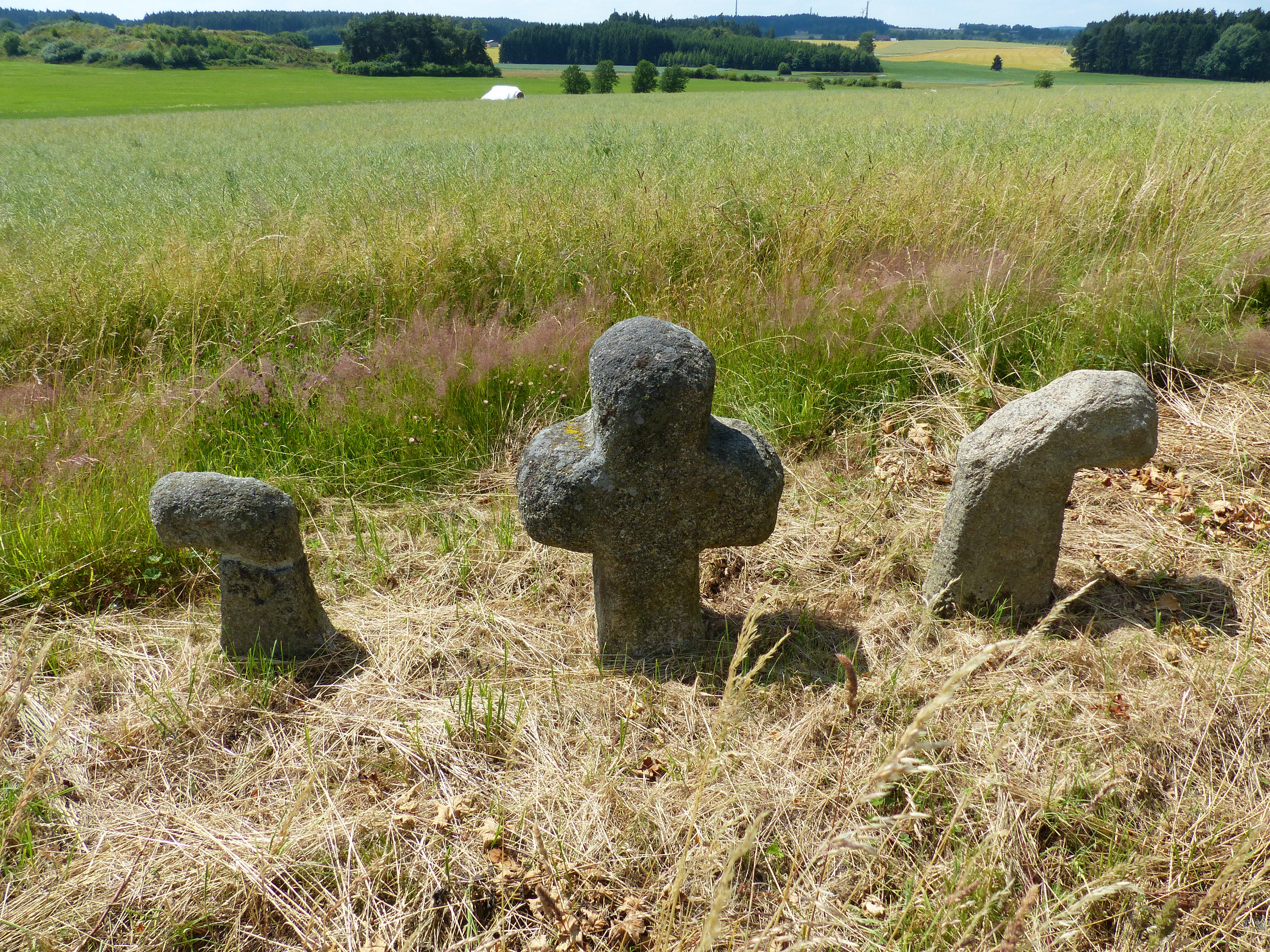 Drei Steinkreuze bei Schnackenhof, Ortsteil von Zell im Fichtelgebirge